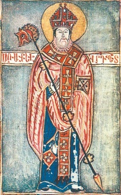 Аракел Сюнеци, миниатюра 1693 года, Матенадаран